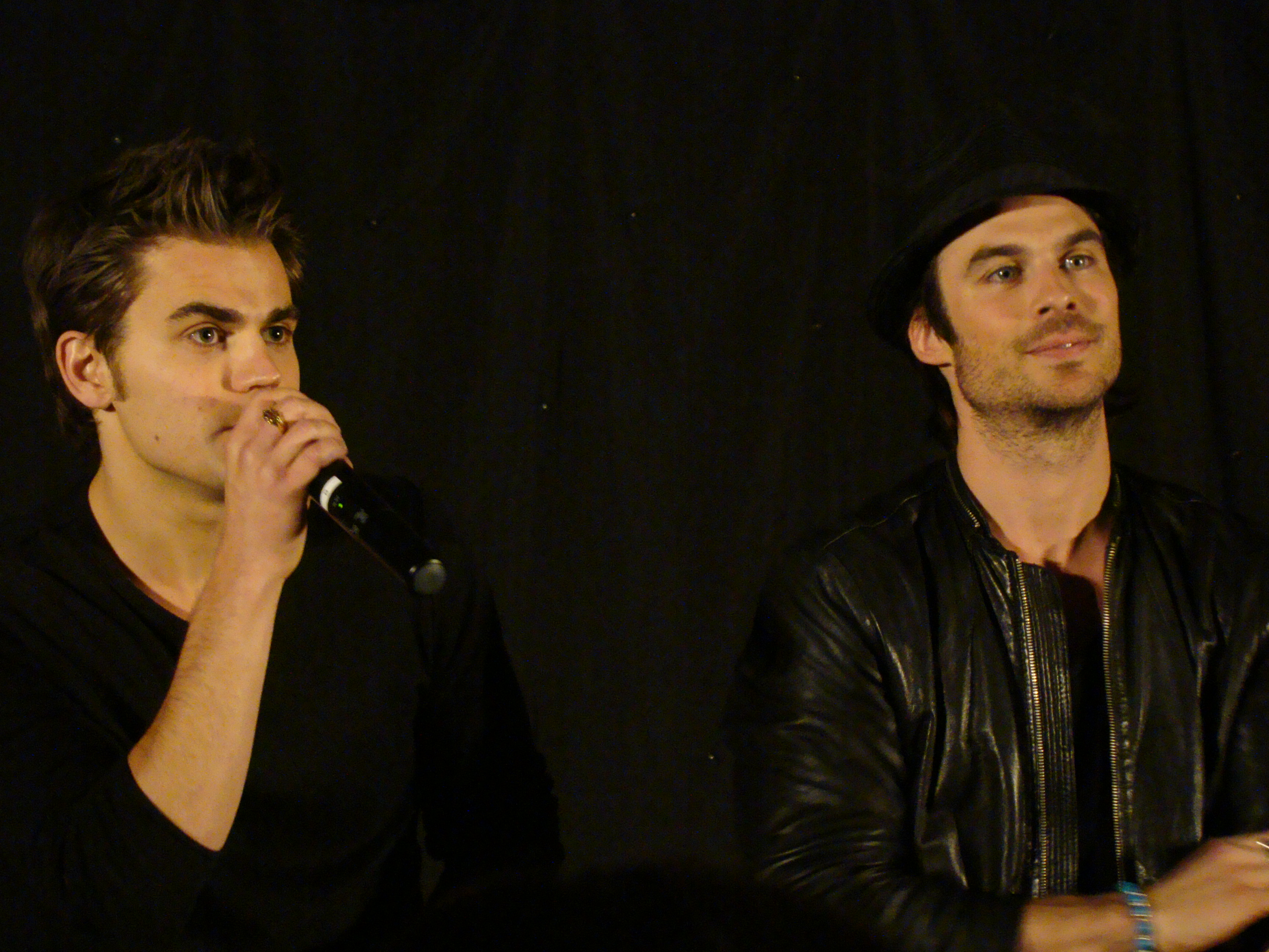 Paul Wesley & Ian Somerhalder